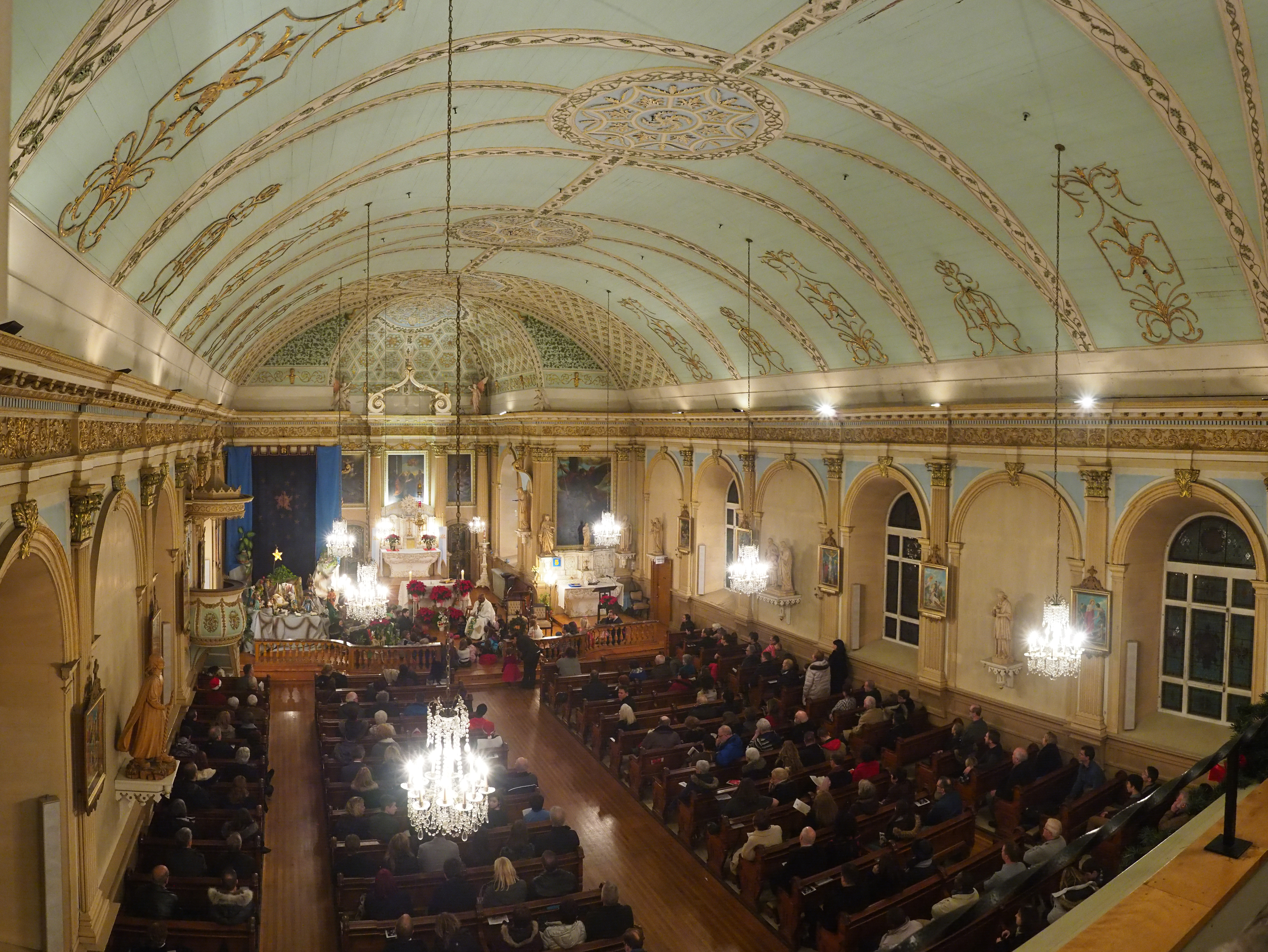 Intérieur de l'église de la Visitation de la Bienheureuse-Vierge-Marie, Montréal, Québec, Canada en 2016.